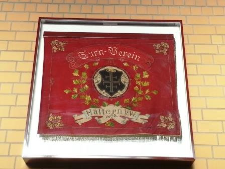 Fahne von 1896 des TV Haltern als Eigentum des ATV Haltern. Eingebracht vom ATV in die Sporthalle der Freiherr von Eichendorff am 08.12.2012